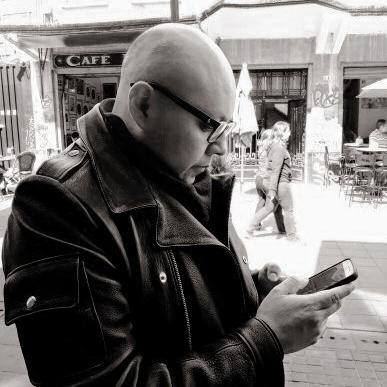 Angel Grave Ville de Mexico 2017